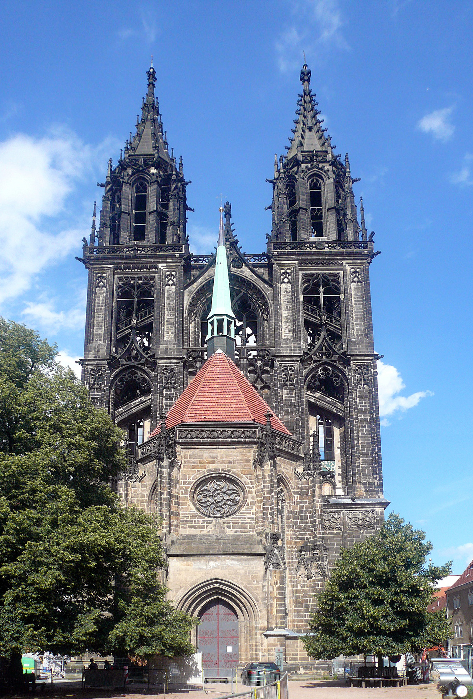 Meißner Dom, evangelische Kirche des Bistums Dresden-Meißen auf dem über die Stadt Meißen erhebenden Burgberg-Ensemble. Die Kathedrale wurde von 1240/1260 bis etwa 1410 mit einer der reichsten und wertvollsten Ausstattungen sächsischer Kirchen erbaut.